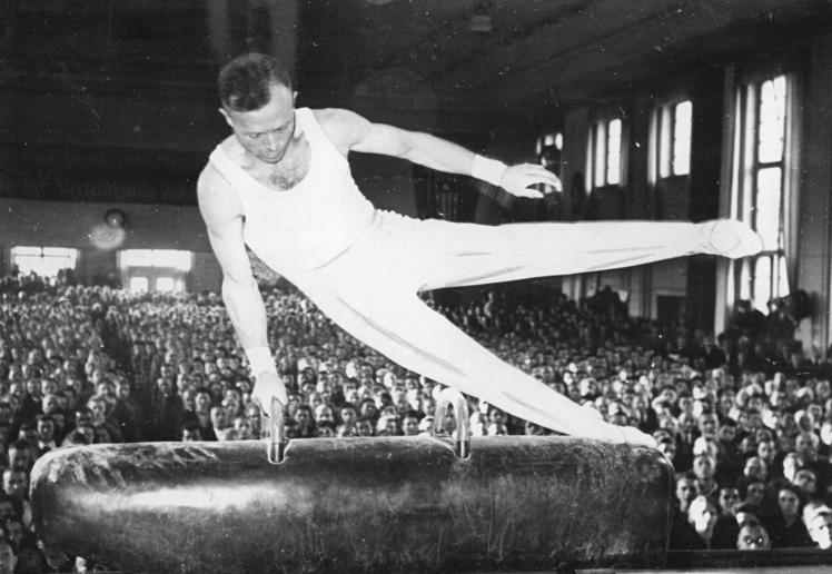 Alfred Müller Illus Th.B.D. 24.10.50 Die Meisterschaften der Deutschen Demokratischen Republik im Geräteturnen fanden am 21. und 22.10.50 in der Sportschule Greiz in Thüringen statt. Der Nachwuchs zeigte hier besonders gute Leistungen. UBz: Altmeister Alfred Müller von der BSG Leuna bei einer Übung am Pferd.